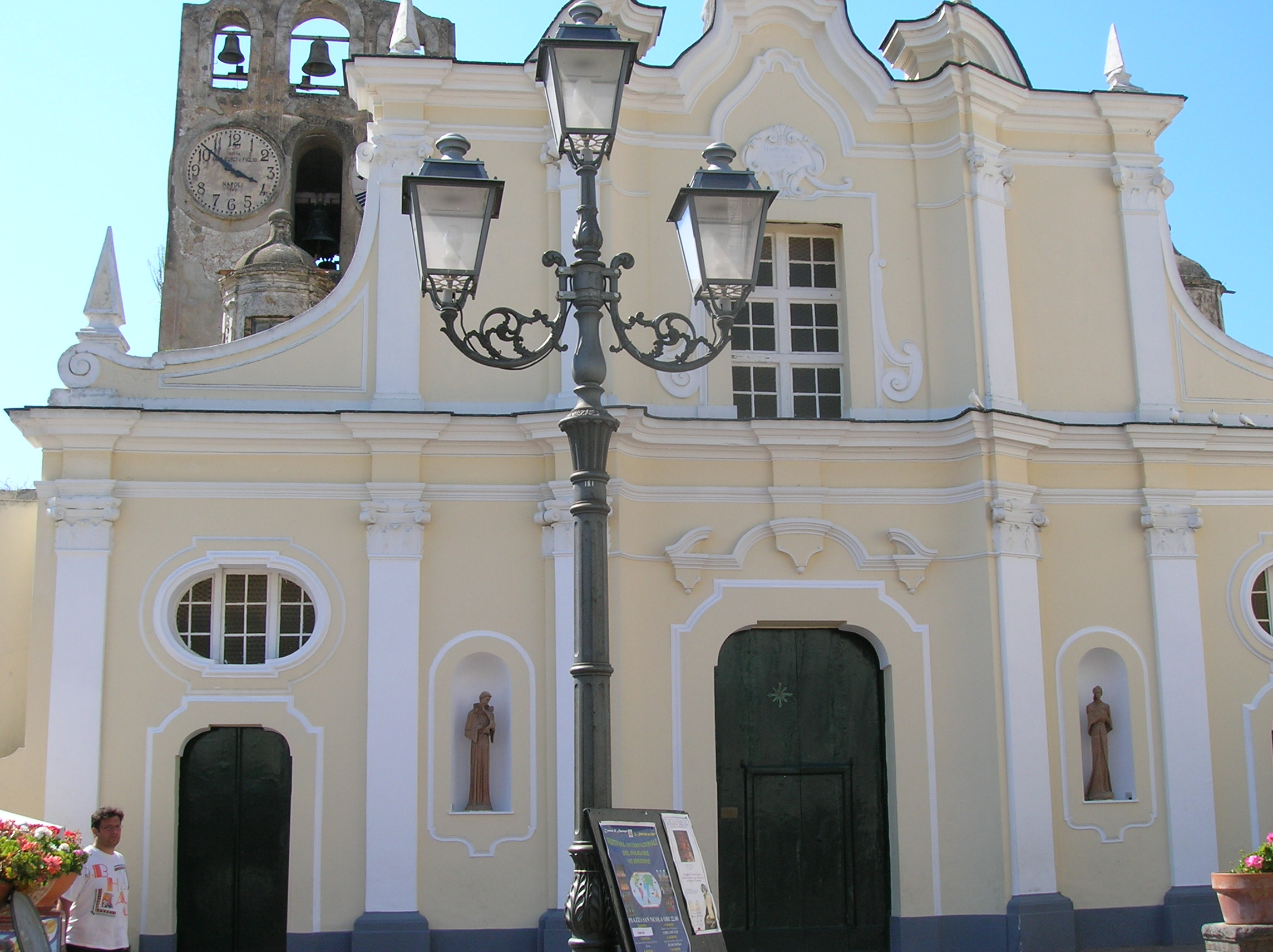 Iglesia Anacapri